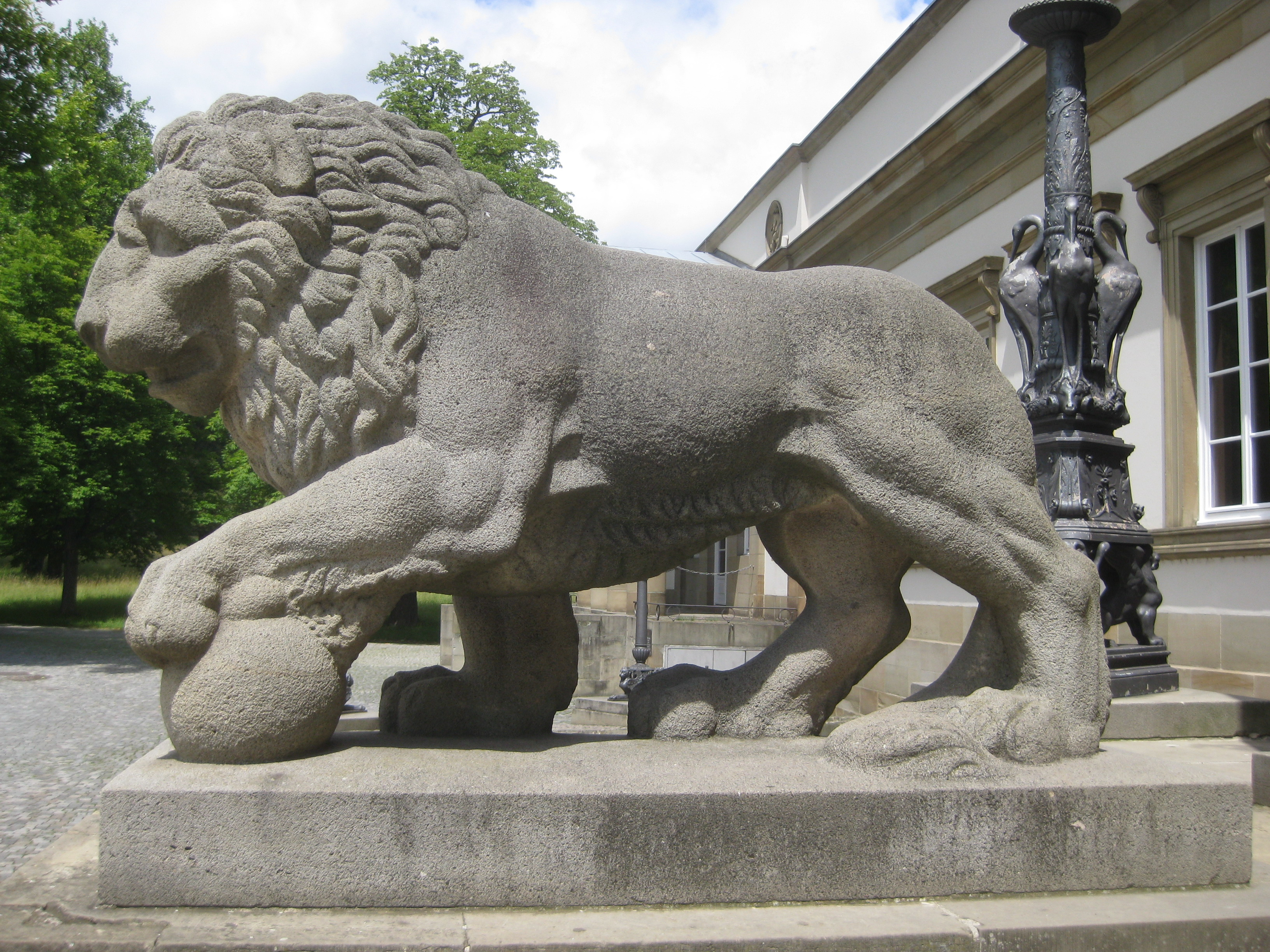 Hermann Brellochs: Zwei Löwen mit Ball, Sandstein, Entstehungsjahr 1960, Stuttgart, Schloss Rosenstein, Südwestfassade, rechts und links vom Haupteingang. Nachbildung von zwei Löwen von Albert Güldenstein, die 1852 von Wilhelm Pelargus in Zink gegossen wurden und an der gleichen Stelle aufgestellt waren, aber seit 1945 verschollen sind.